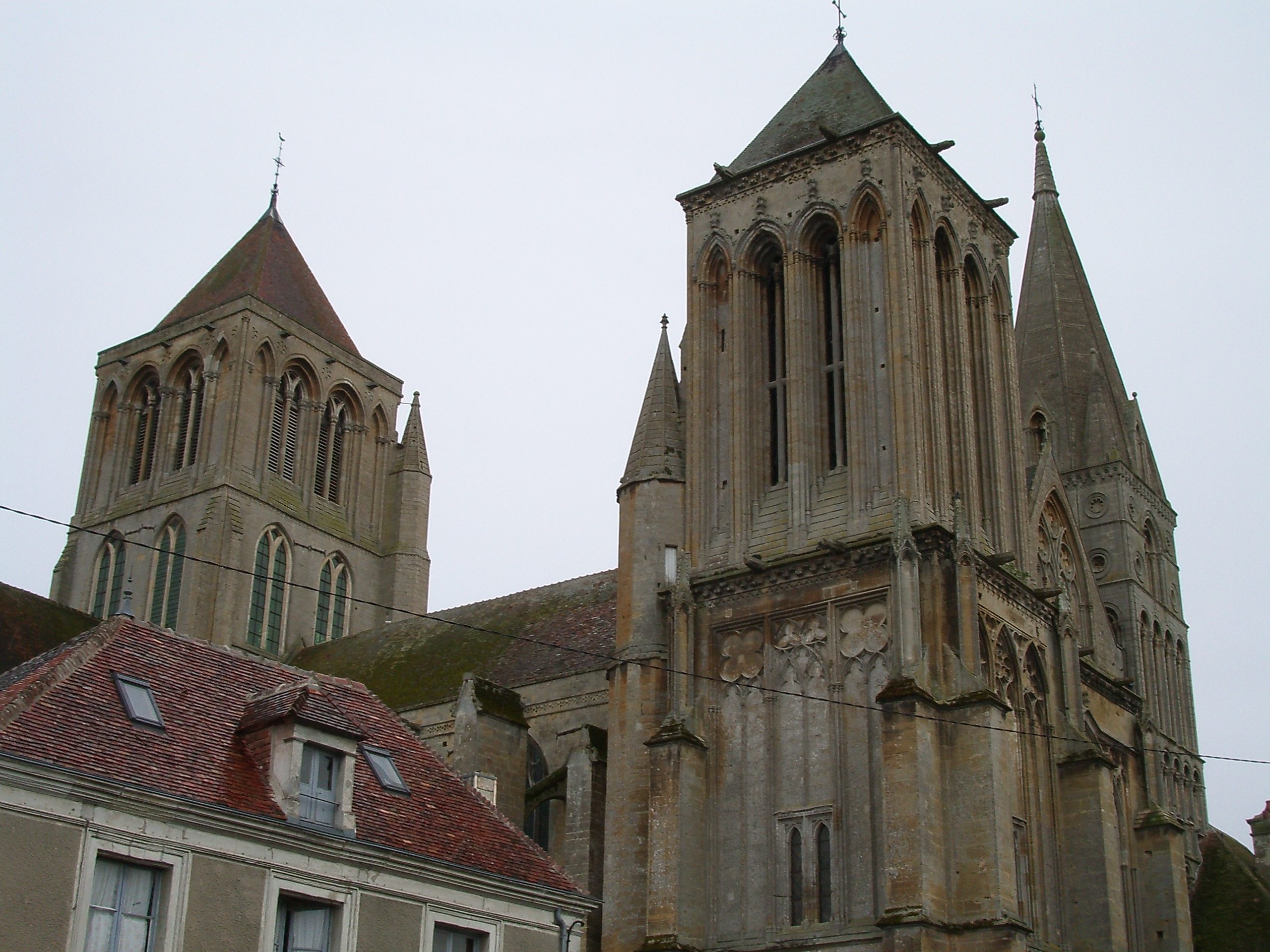 Église abbatiale de Saint-Pierre-sur-Dives (Normandie, France)